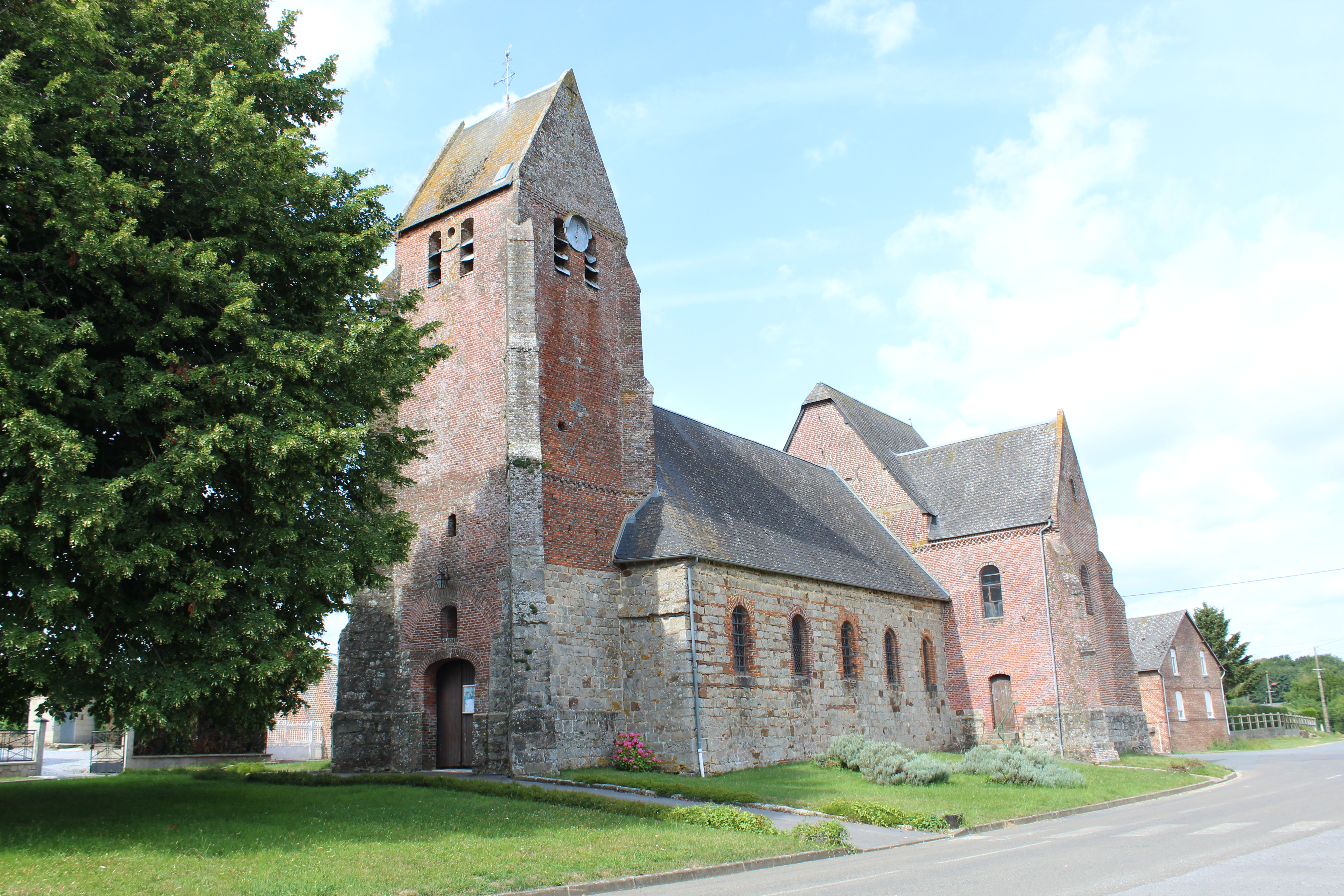 L'église